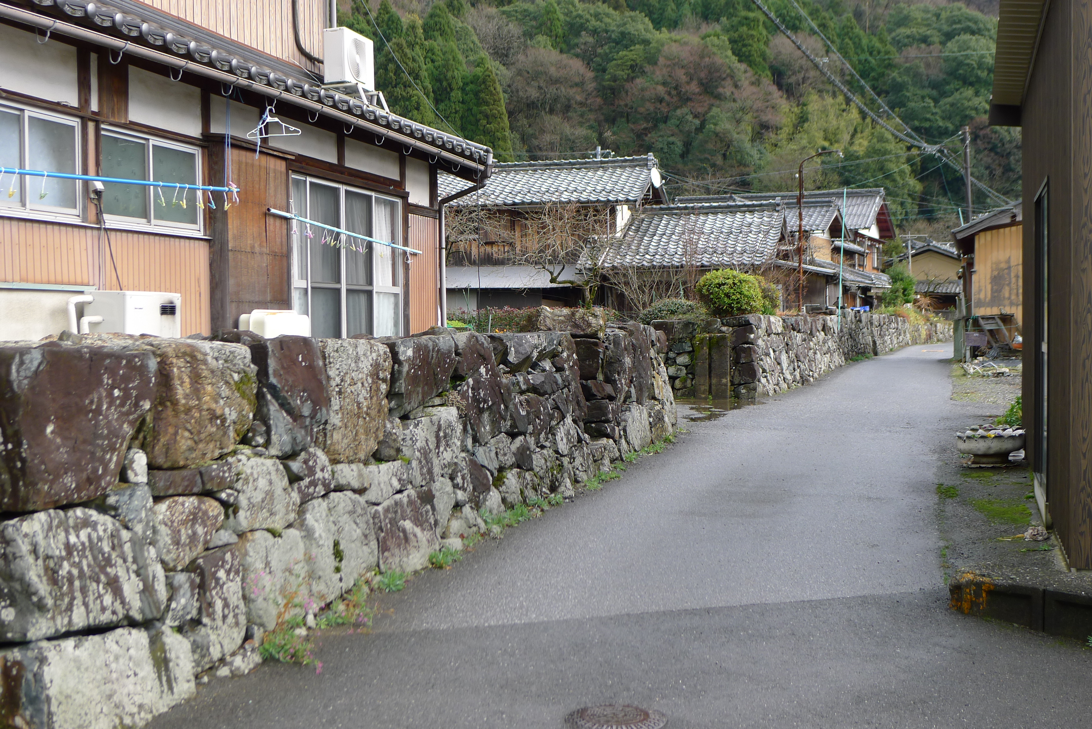 「菅浦の湖岸集落景観」：湖岸集落の石垣